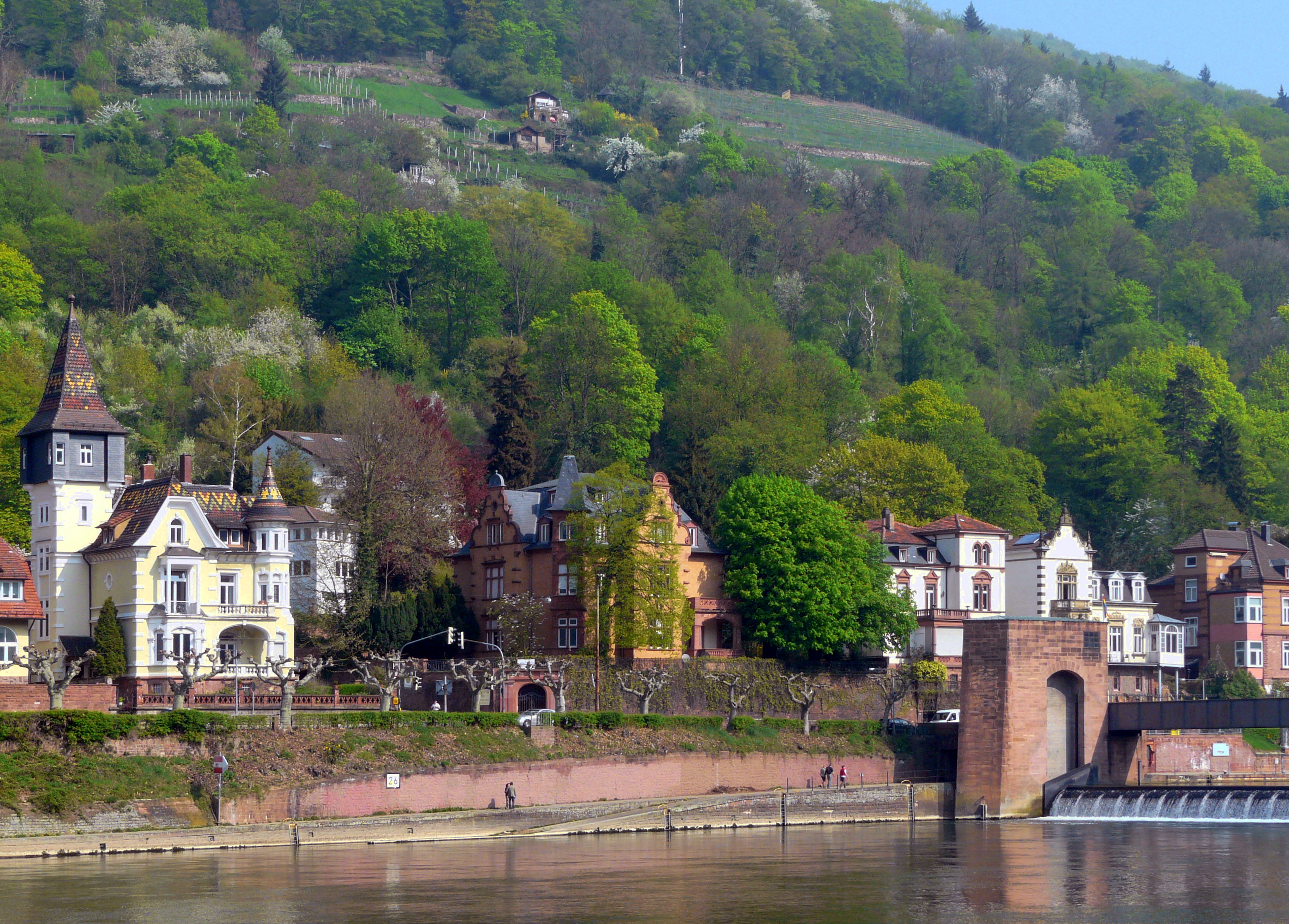 Blick von einem Boot der Rhein-Neckar-Fahrgastschifffahrt auf Heidelberg-Neuenheim und das Wehr zwischen Neuenheim und der Altstadt